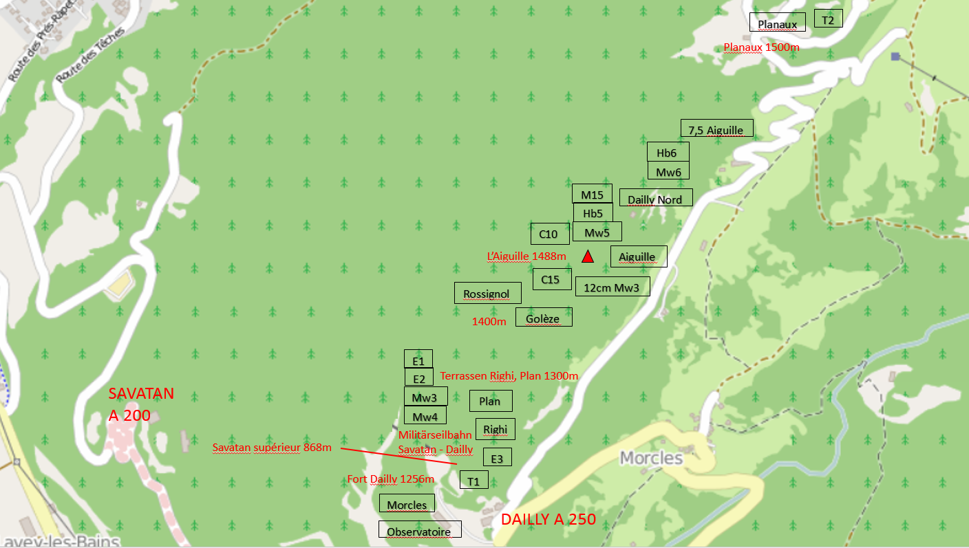 Festung Salvatan und Dailly, Lavey-Morcles VS, Schweiz